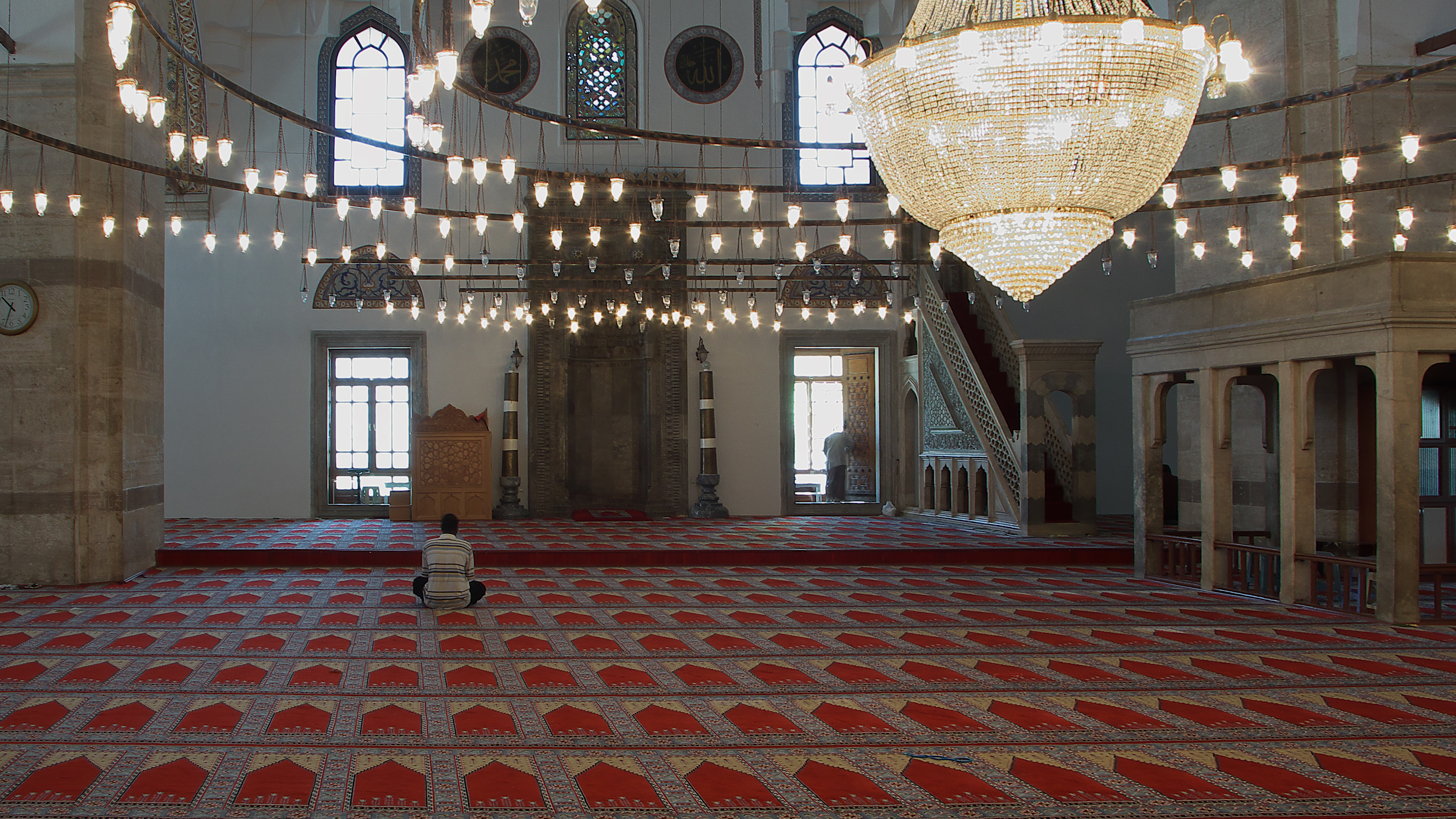 Interior de la mezquita (1558-1567)